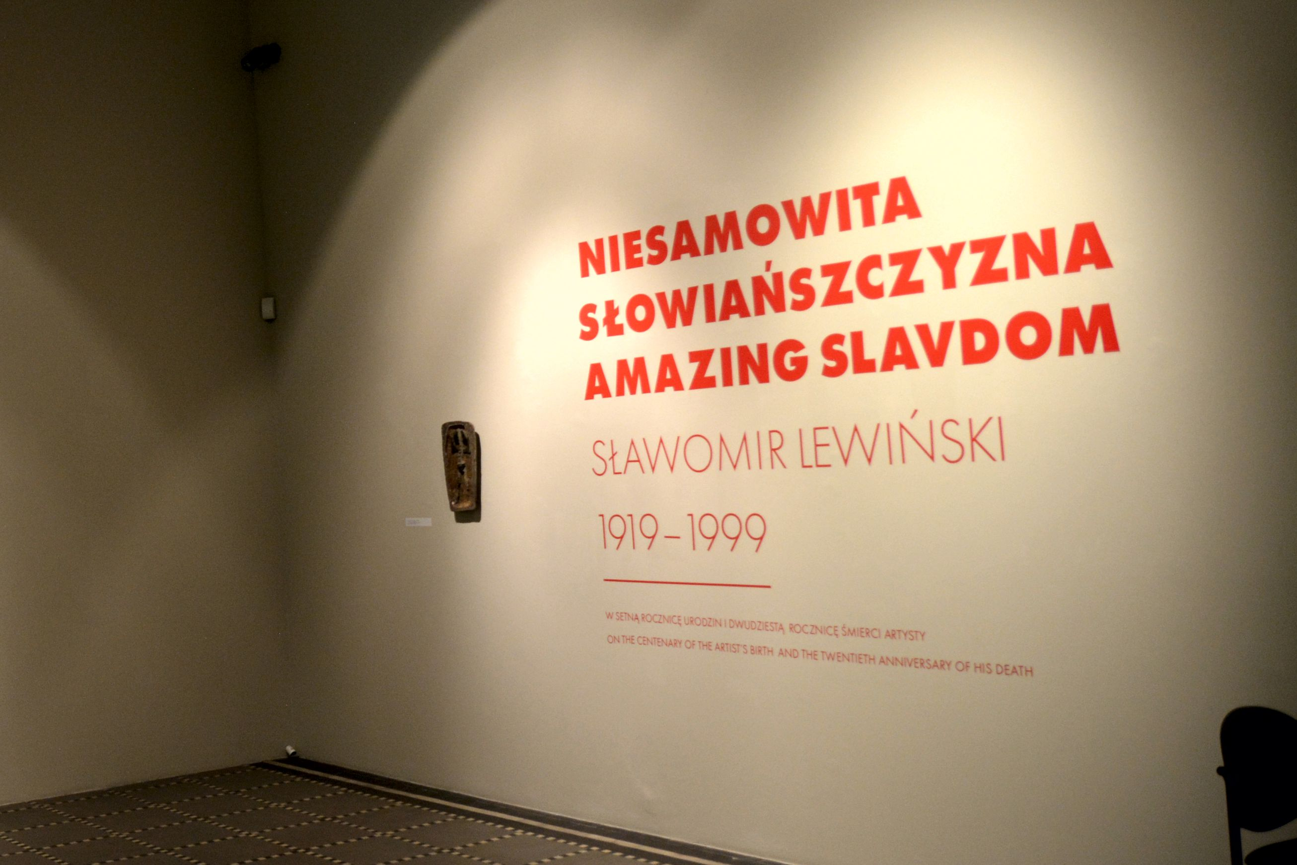 Fragment wystawy czasowej "Niesamowita Słowiańszczyzna. Sławomir Lewiński 1919–1999" w Muzeum Narodowym w Szczecinie